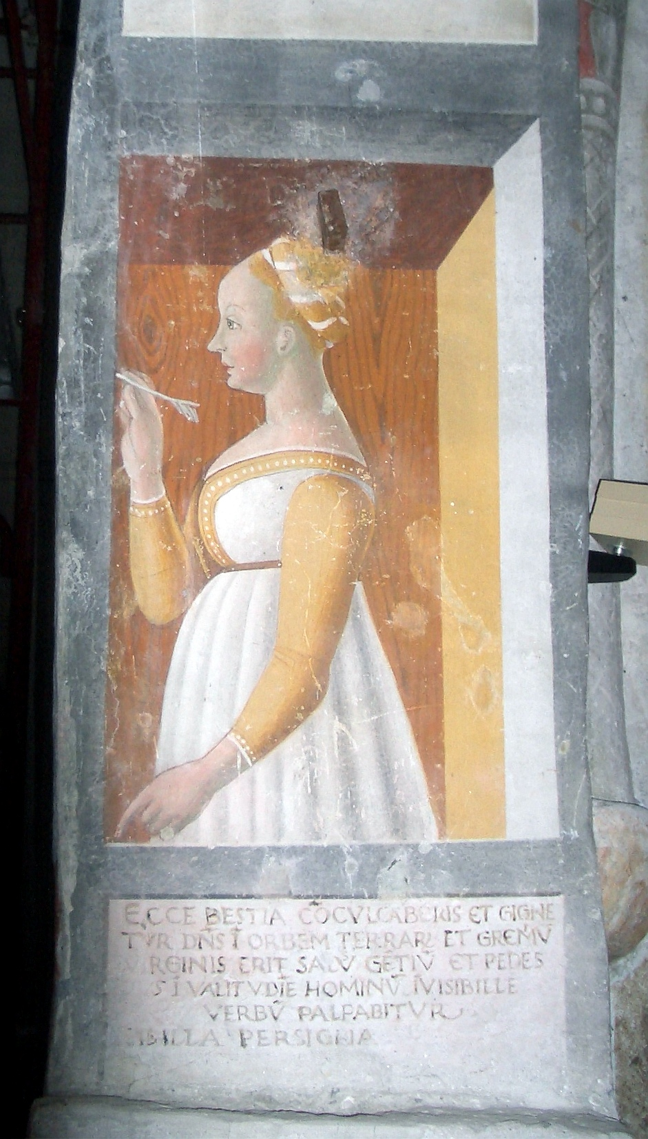 Giovanni Pietro da Cemmo, ‘’The Persian Sibyl’’, fresco, 1483- 1486, San Rocco church, Bagolino, Brescia, Italy